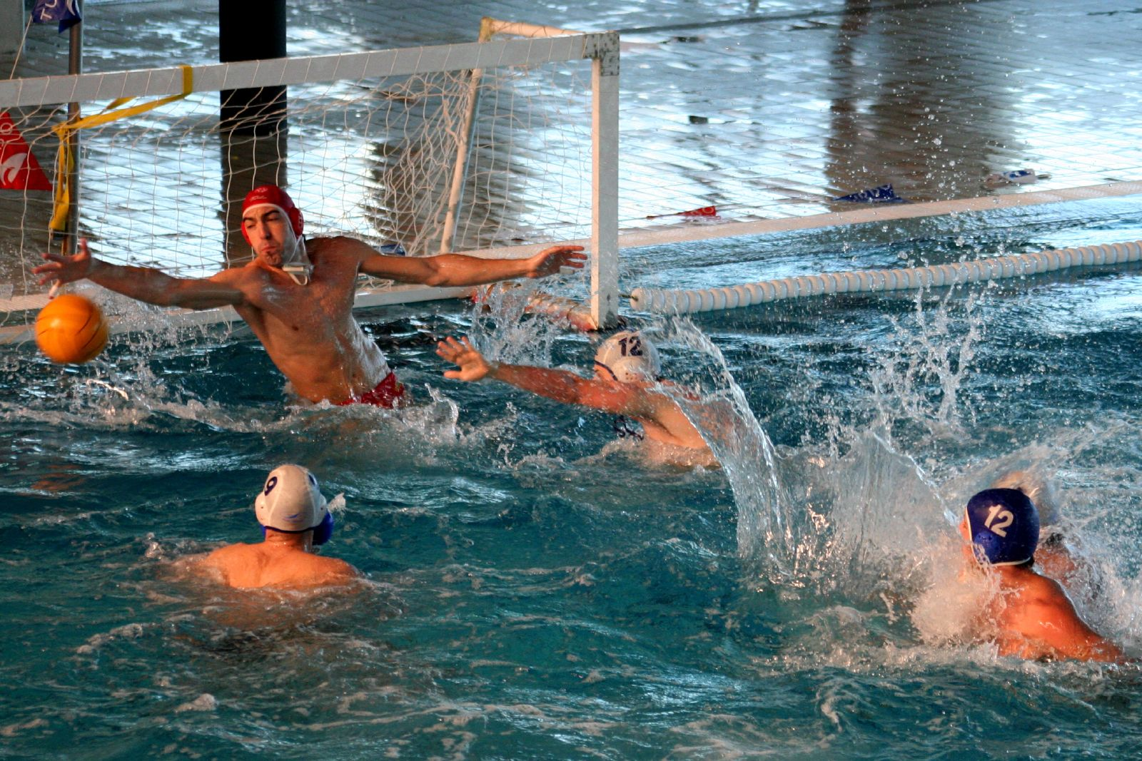 Partido de Waterpolo en Jaén, España.